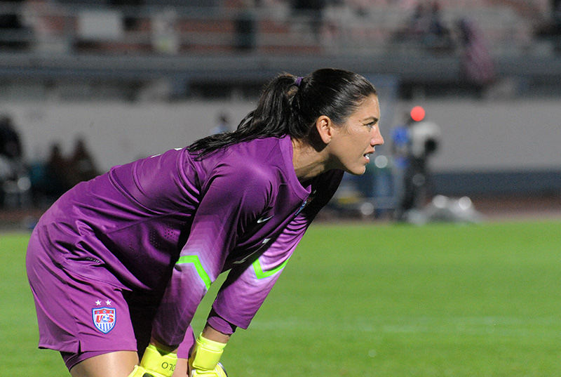 a_49_5562